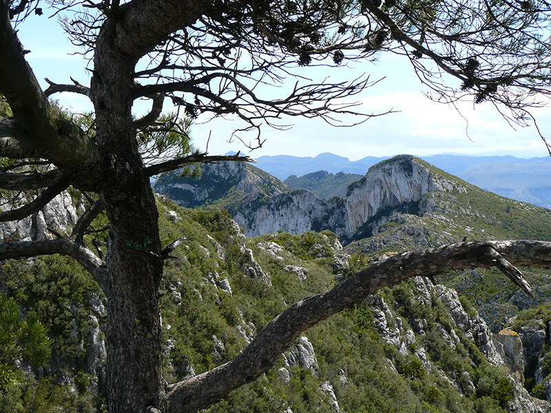 Sierra de Corbera This is a photography of a Special Area of Conservation in Spain with the ID: ES5233013. Natura2000 entry, EEA entry